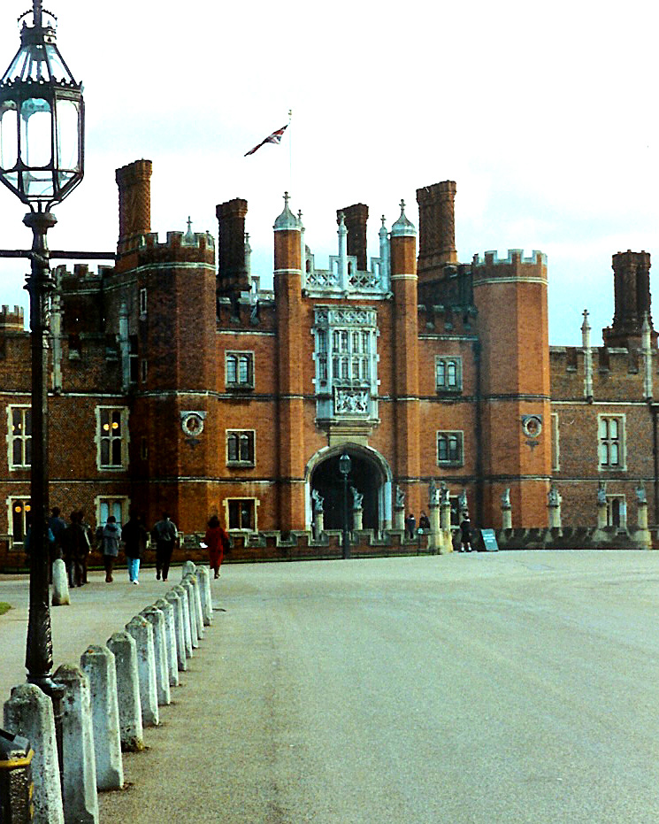 Schlass vun Hampton Court1